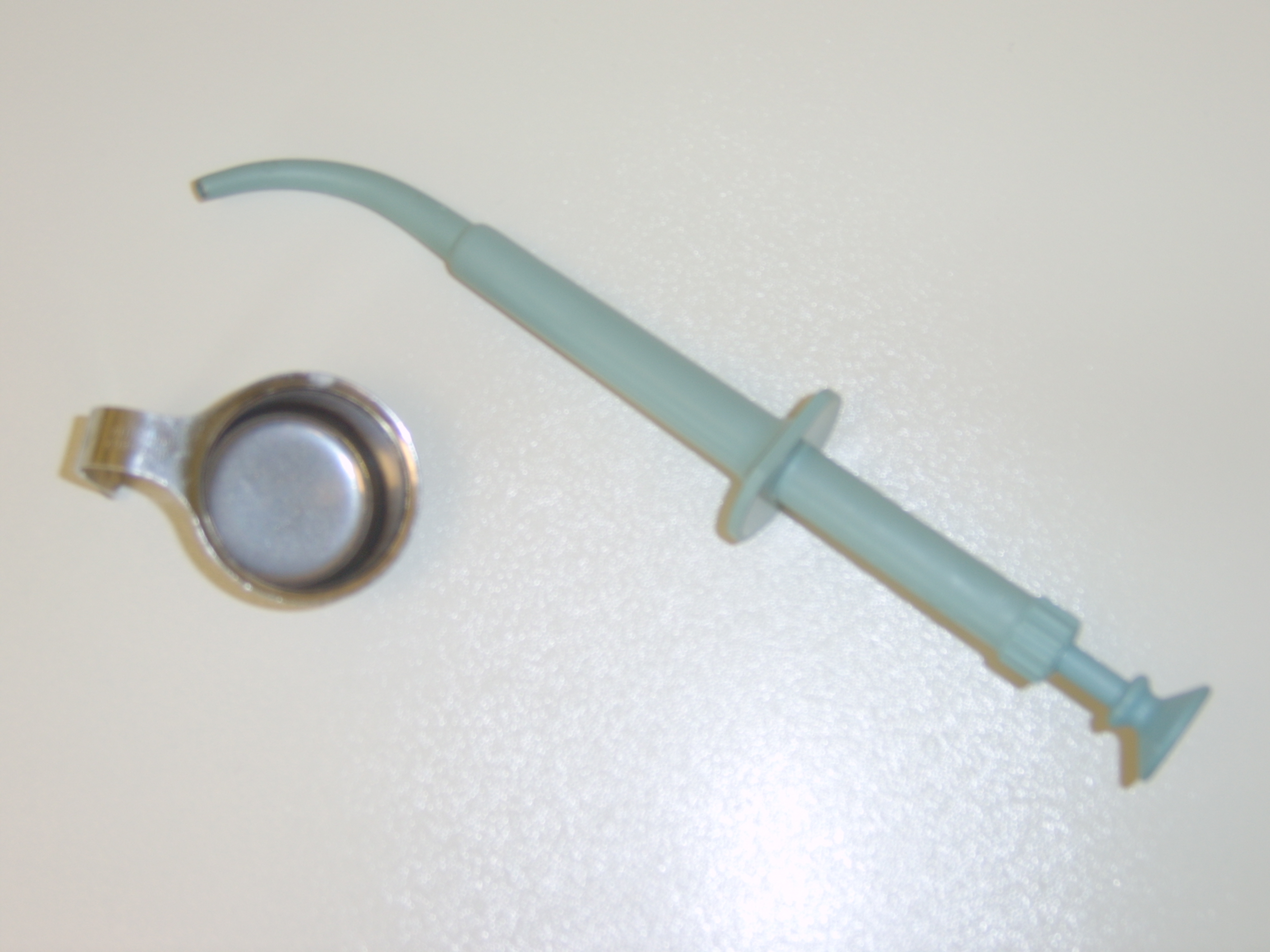 Amalgampistole für Amalgamfüllungen